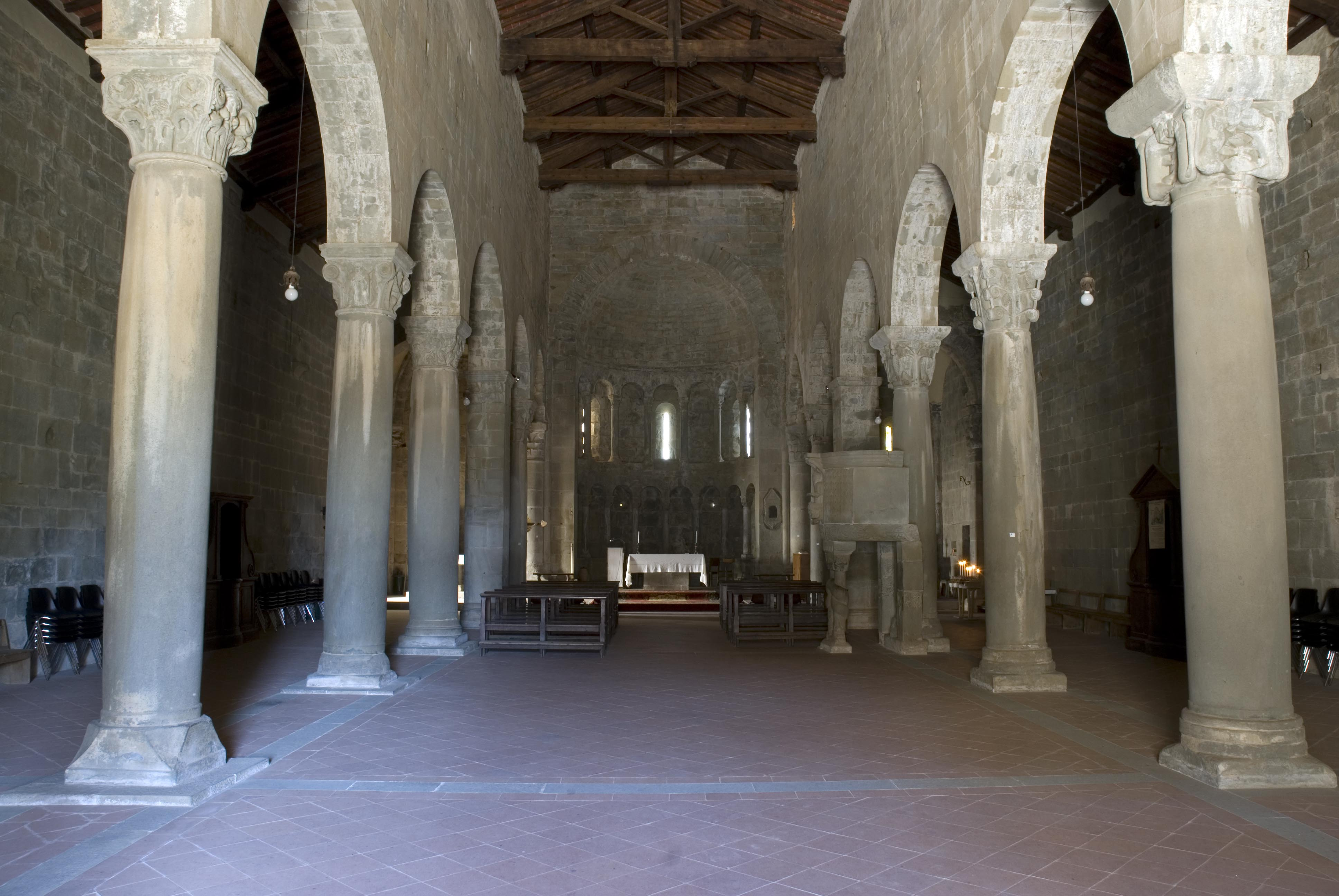 Interno della Pieve di Gropina